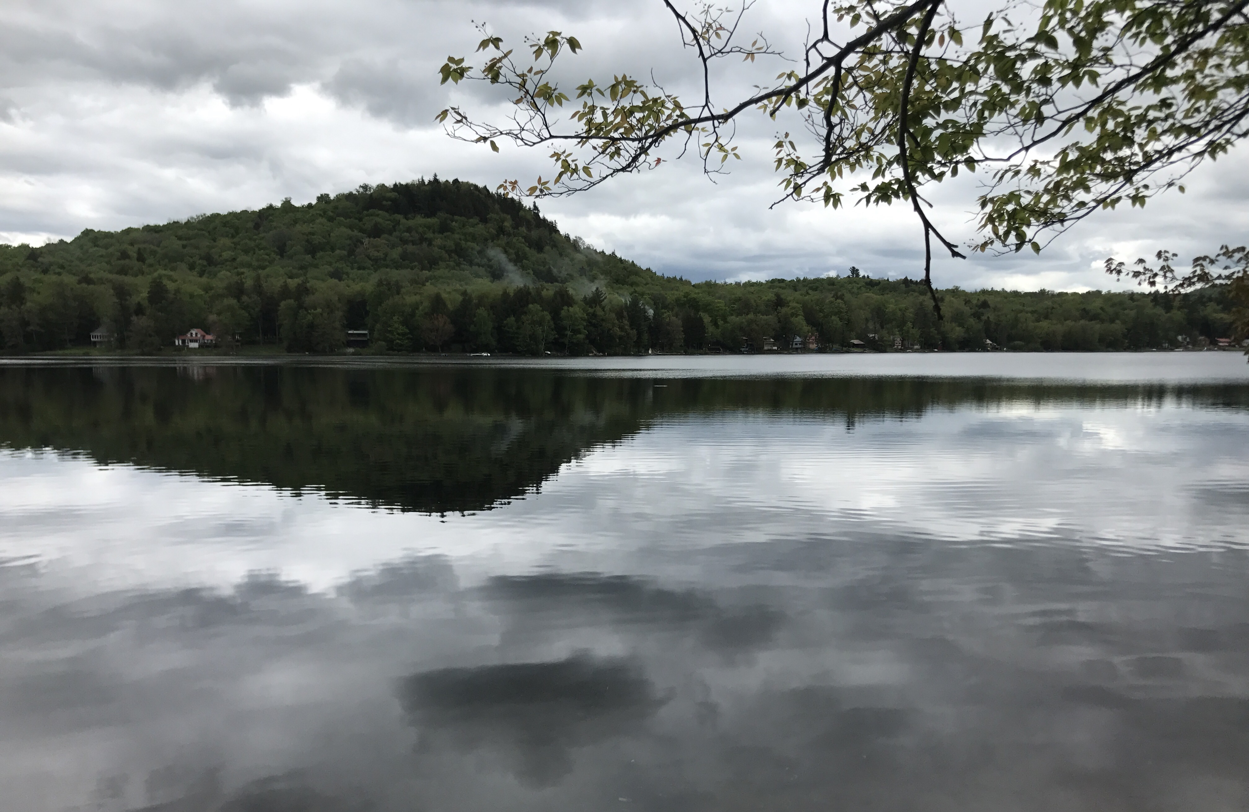 Middle stoner lake ny